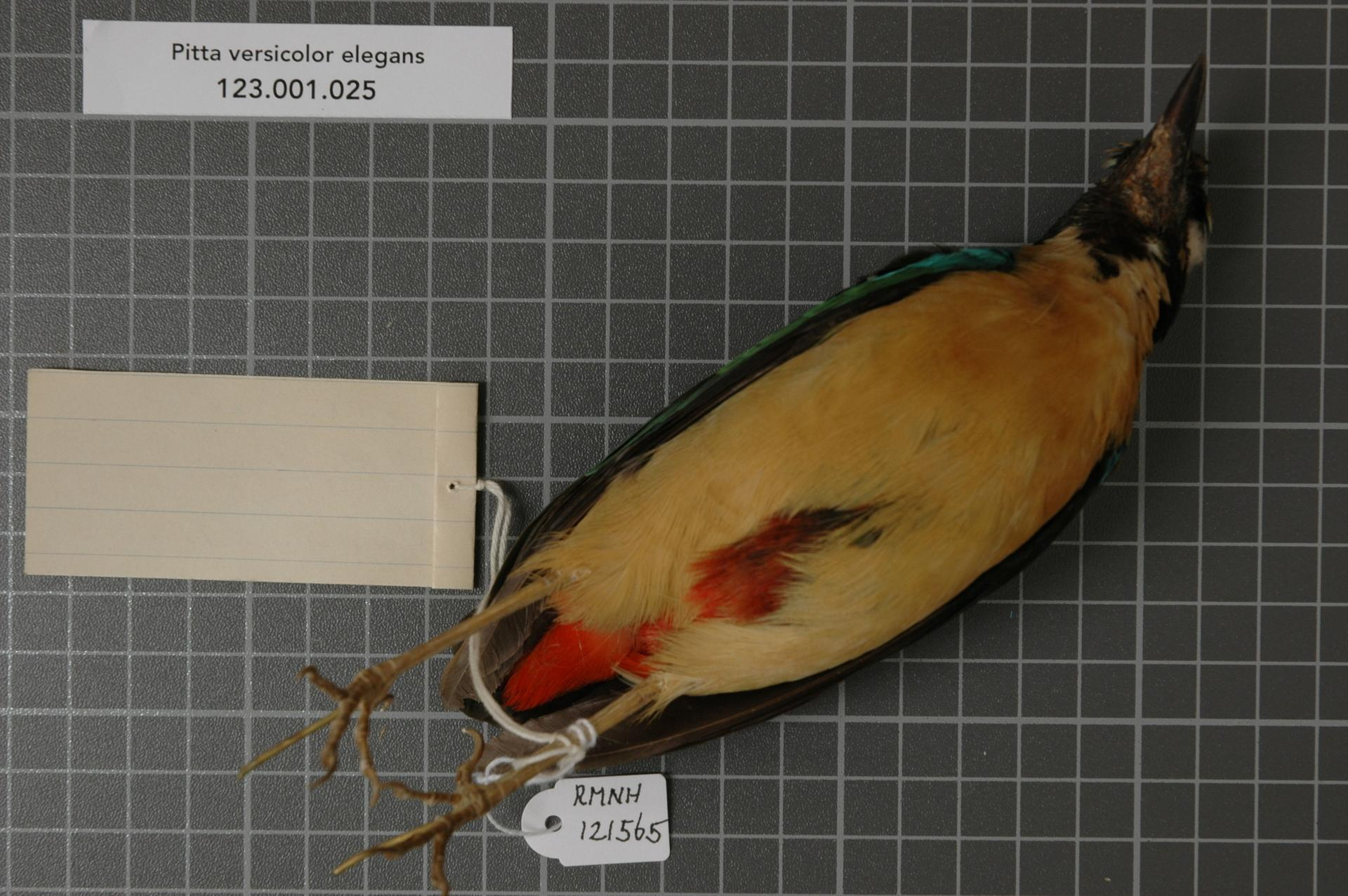 Pitta versicolor elegans Temminck, 1836